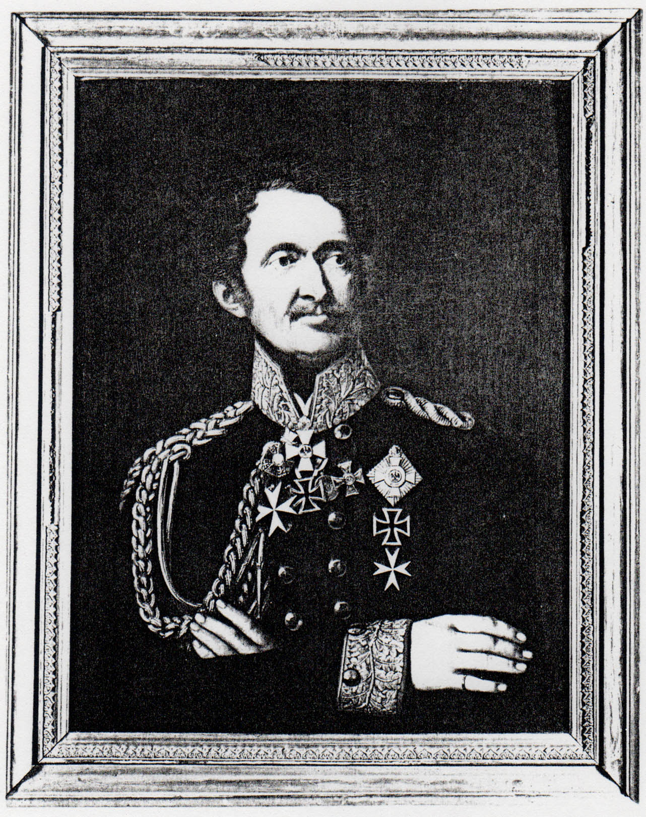 Friedrich Heinrich Ludwig von Pfuel (* 1781; † 1846), war ein königlich-preußischer Generalleutnant, Kommandant von Saarlouis, sowie Kommandant der Zitadelle Spandau